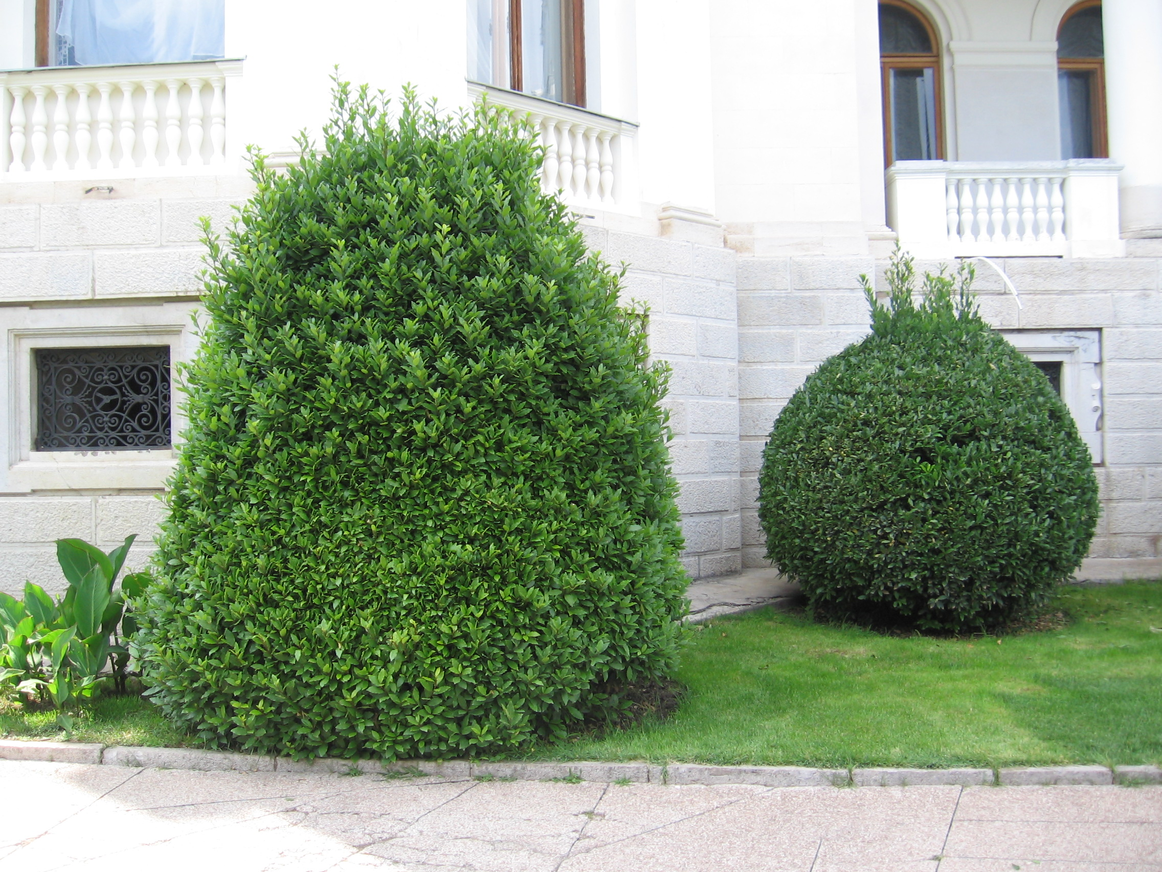 Фото